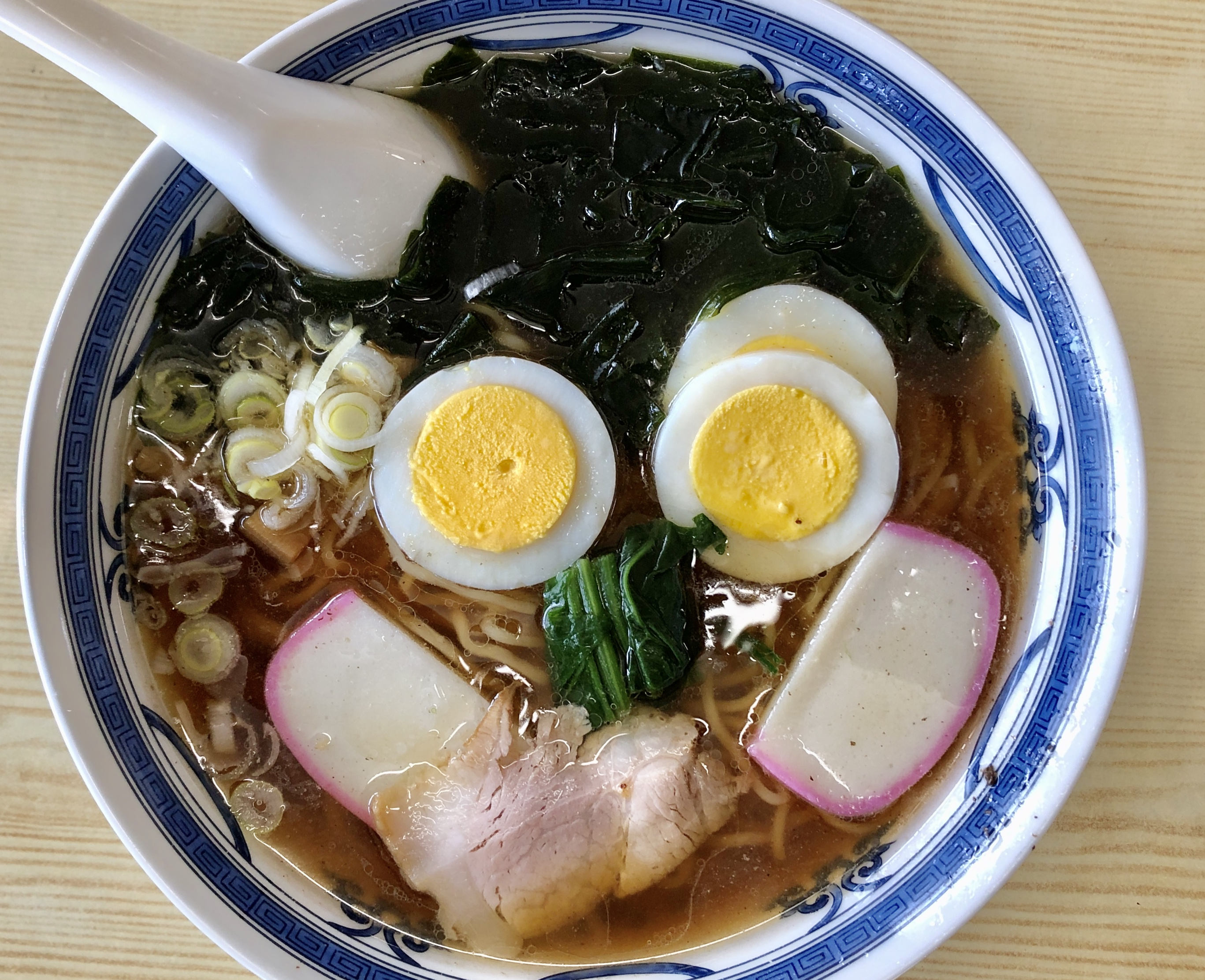 ニコニコ共和国に関する写真